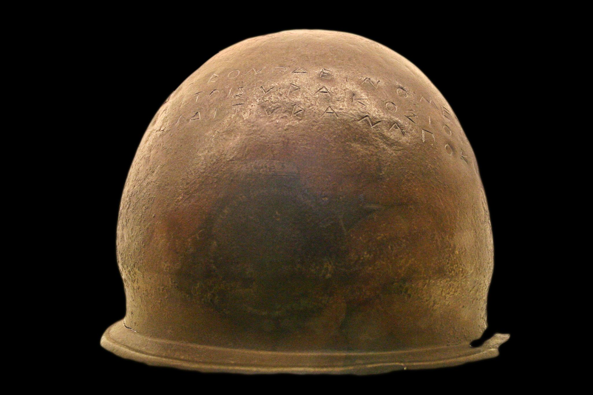 Elmo di Ierone del V sec. a.C. In alto vi è incisa la seguente frase: "Ierone, il Dinomenide, e i Siracusani [dedicano] a Zeus [dalla preda] dei Tirreni, da Cuma"